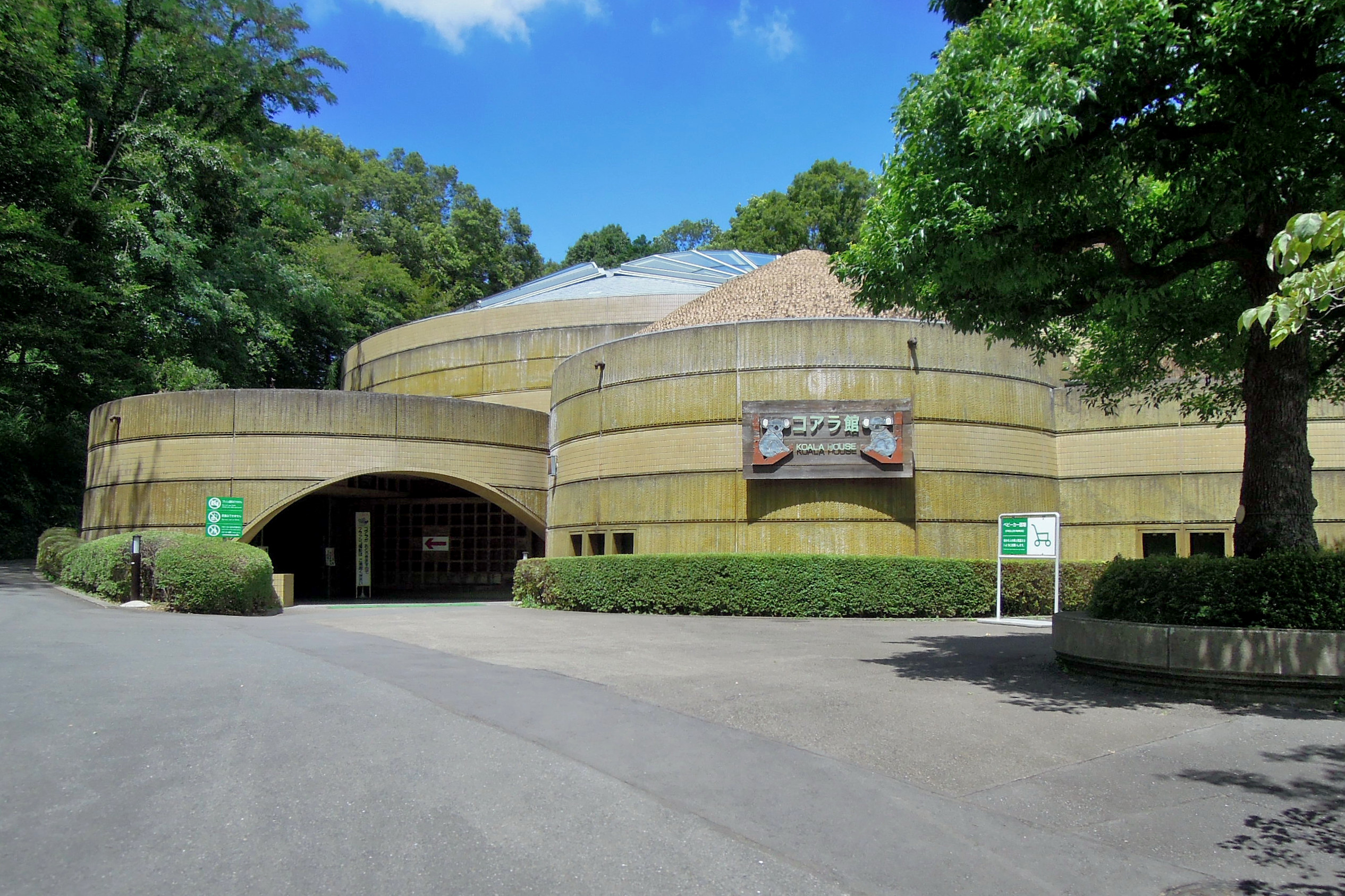 2012年8月2日木曜日、多摩動物公園にて、Nikon COOLPIX P300で撮影。